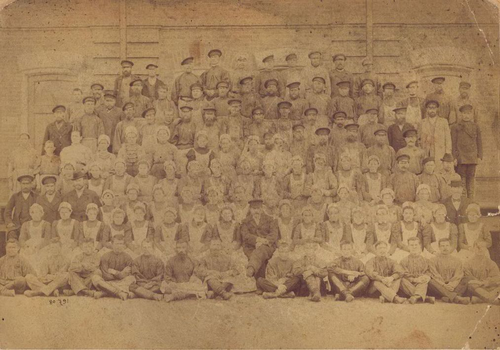 Первый коллектив Пермского спиртоочистительного завода. Снимок французской фотостудии "De Jongh frères".